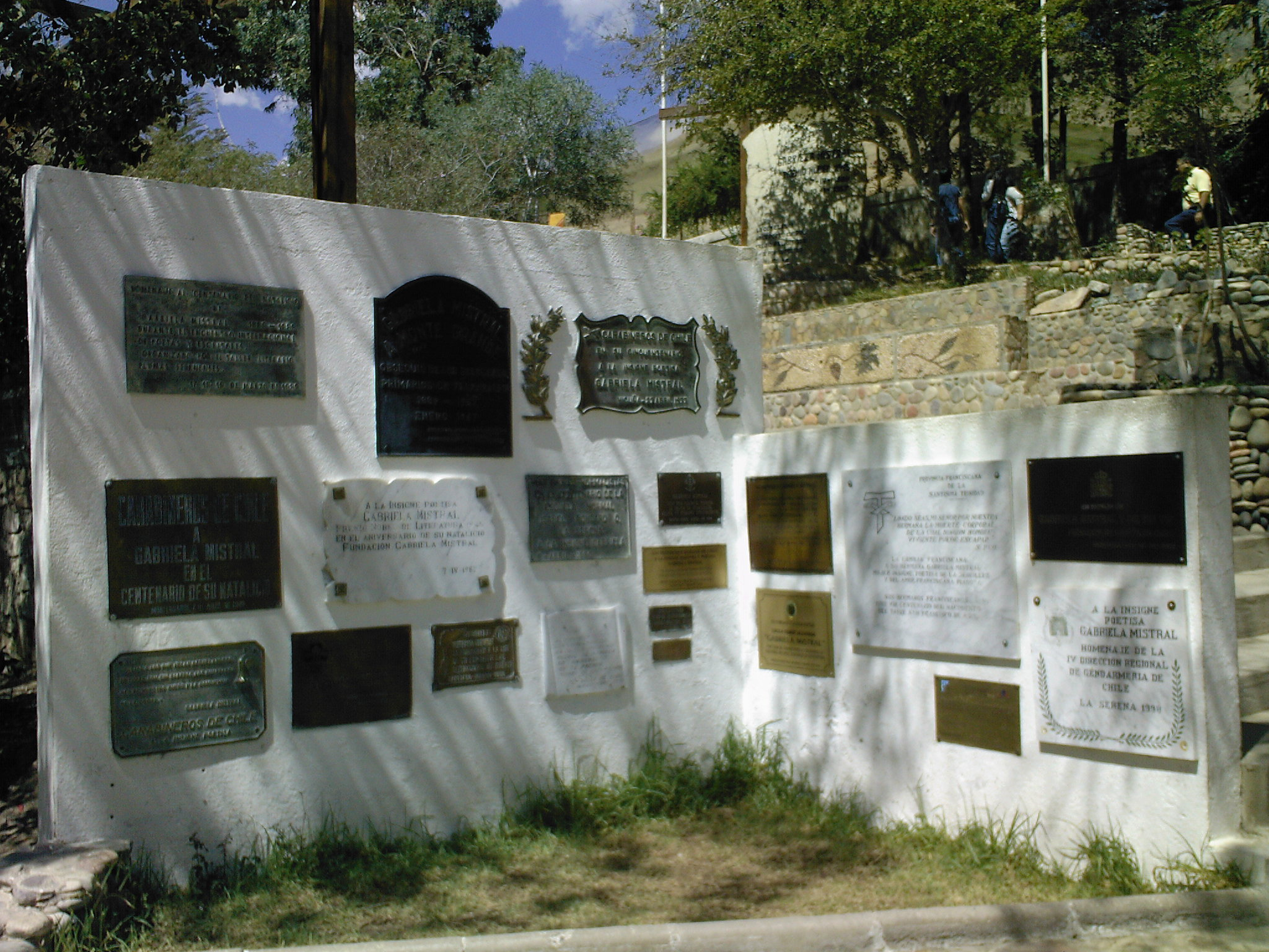 Placas conmemorativas acceso mausoleo This is a photo of a national monument in Chile: 352